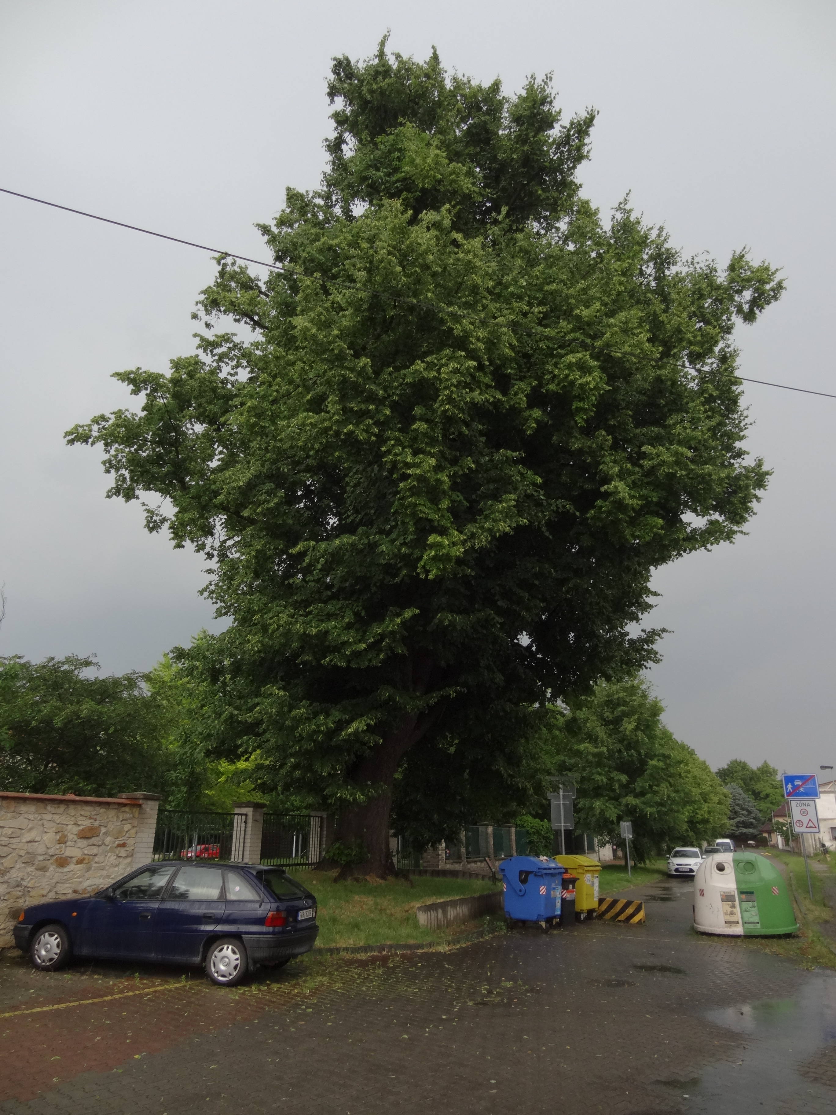 Kbely - památná lípa srdčitá v Krnské ulici